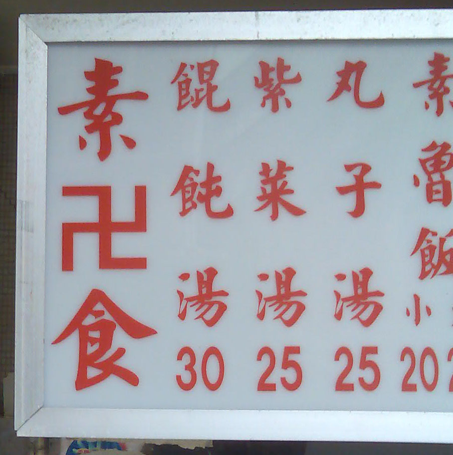 Taiwanese vegetarian sign